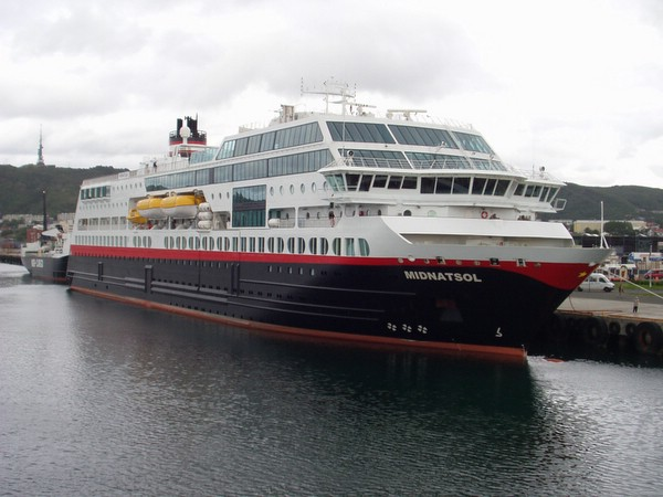 MS Midnatsol im Hafen von Bodø